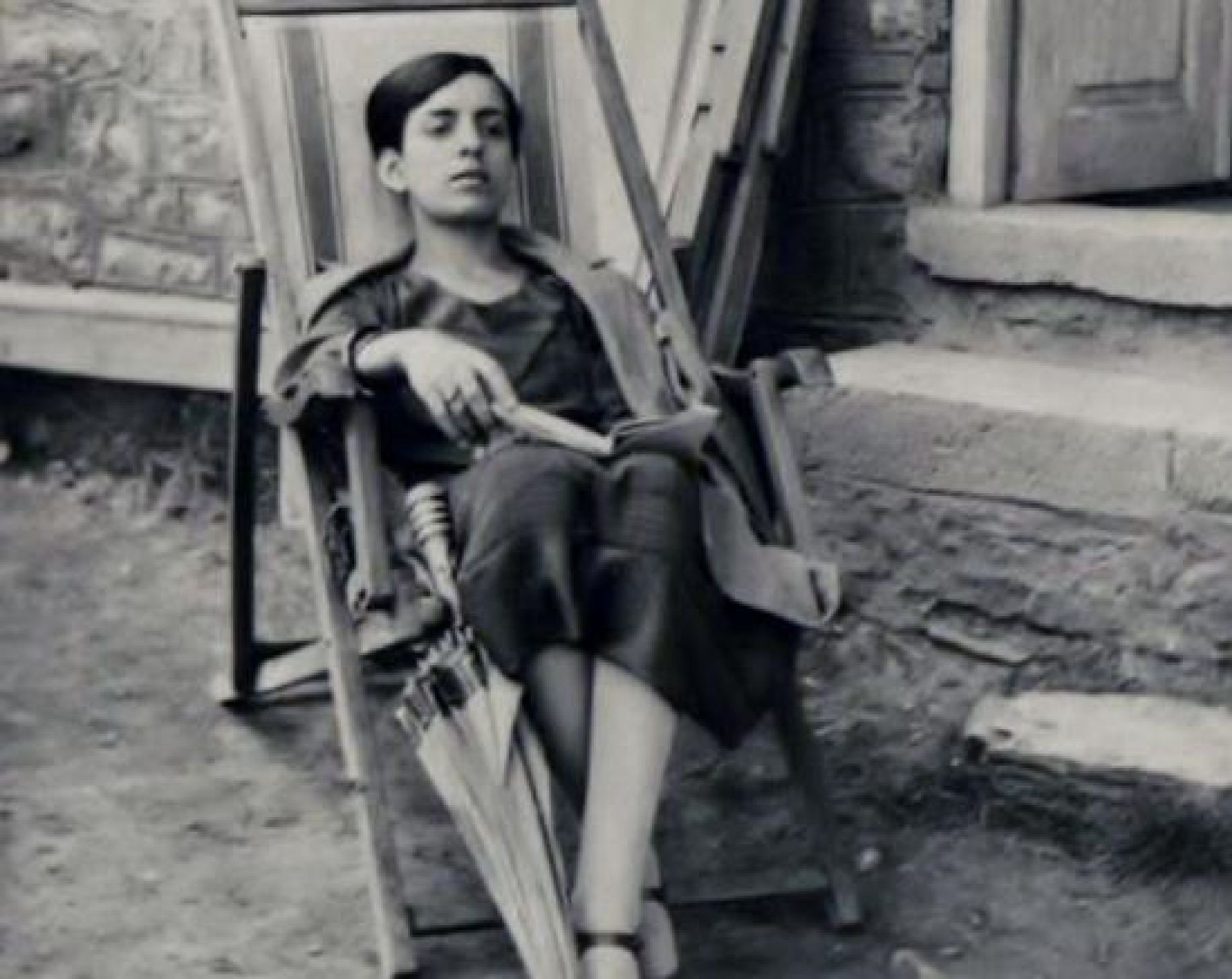 Maria Poliduri.